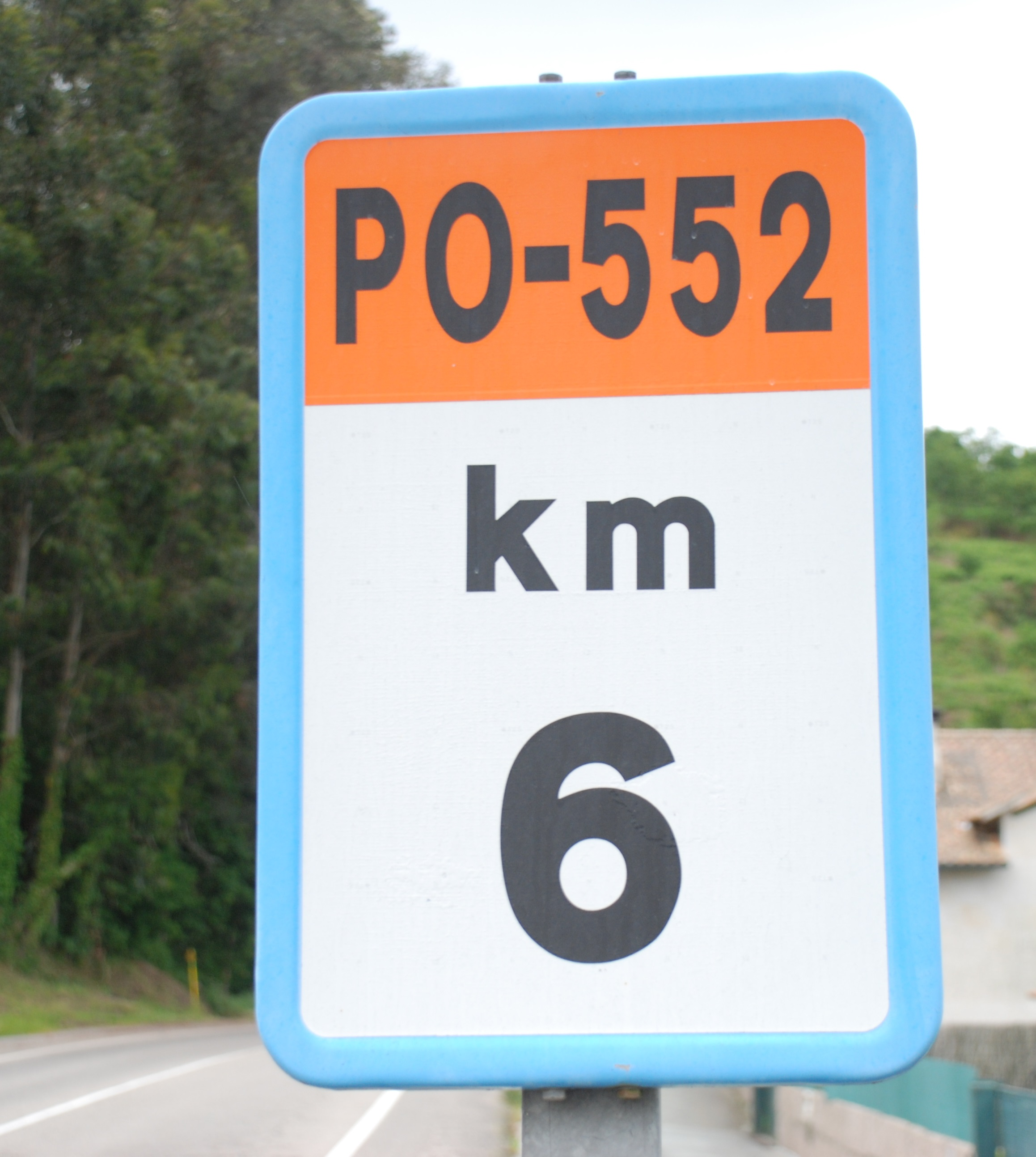 Hito kilométrico de la carretera PO-552 (España)